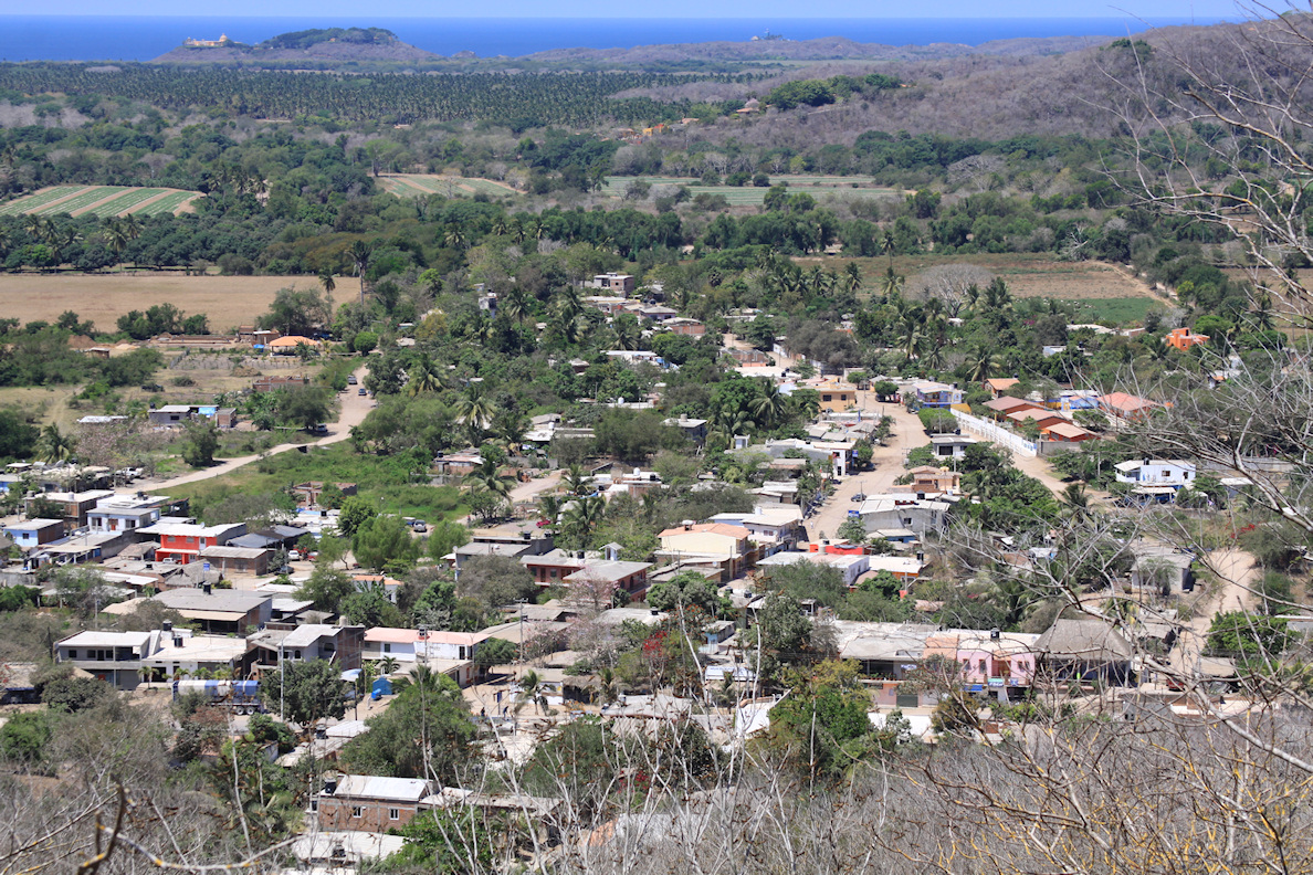 Vista de Emiliano Zapata y Francisco Villa, Municipio de la Huerta, Jalisco